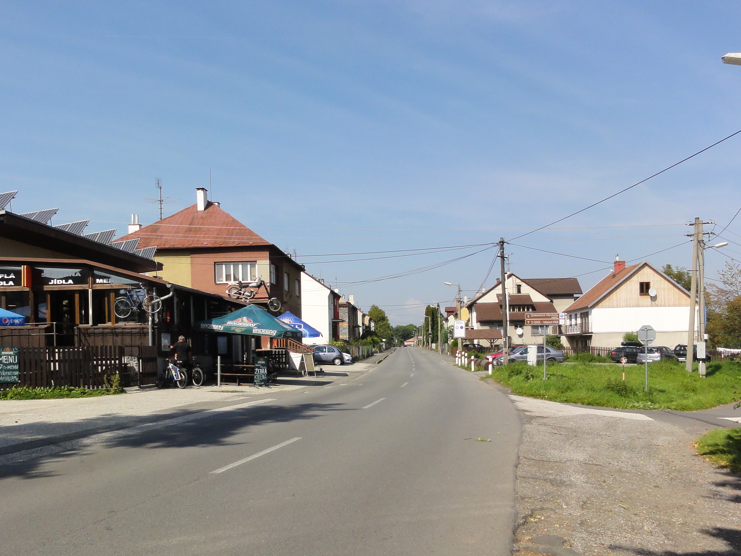 Centrum Łucyny